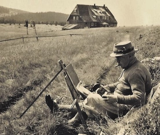 An der Staffelei